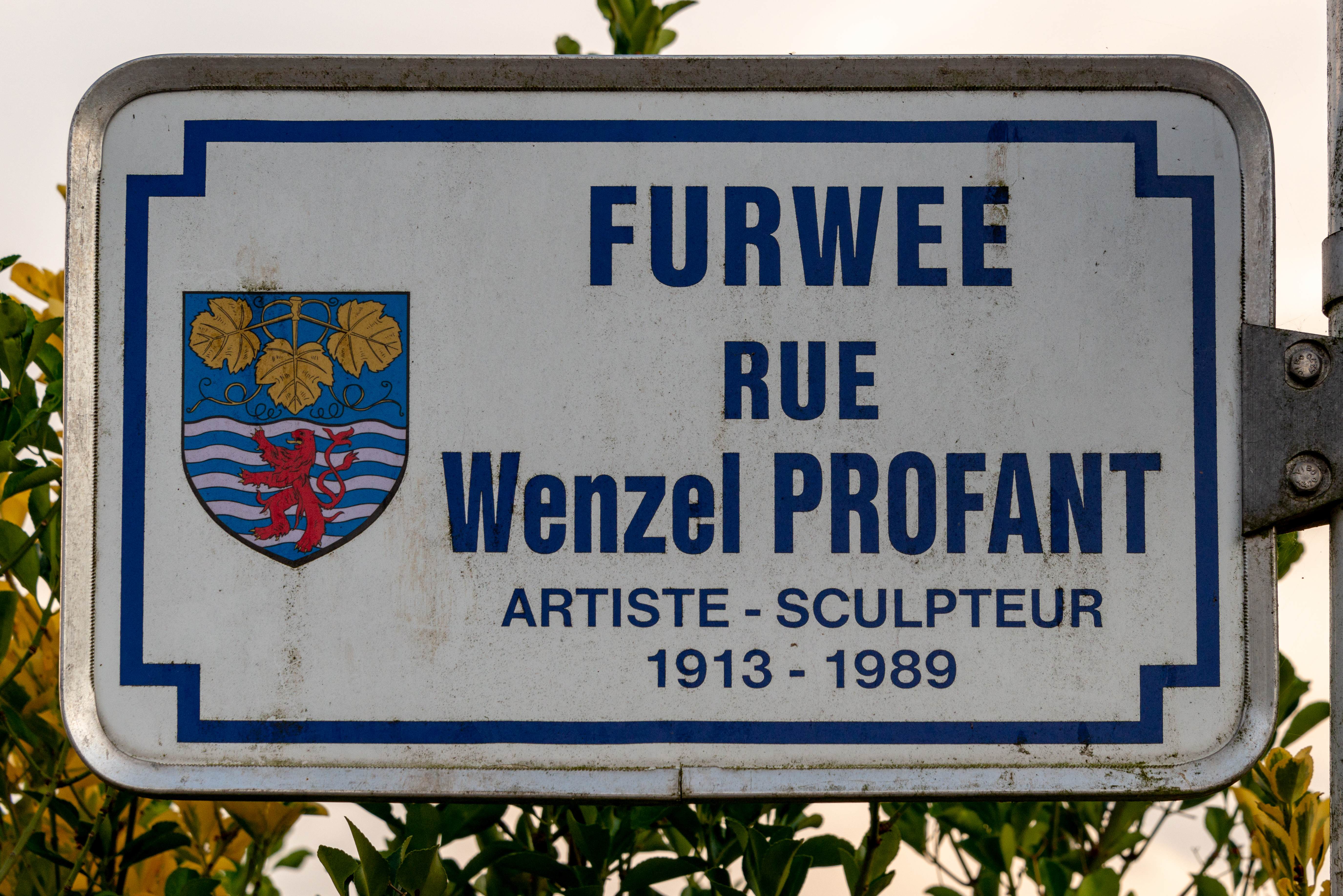 Stroosseschëld zu Bech-Maacher.